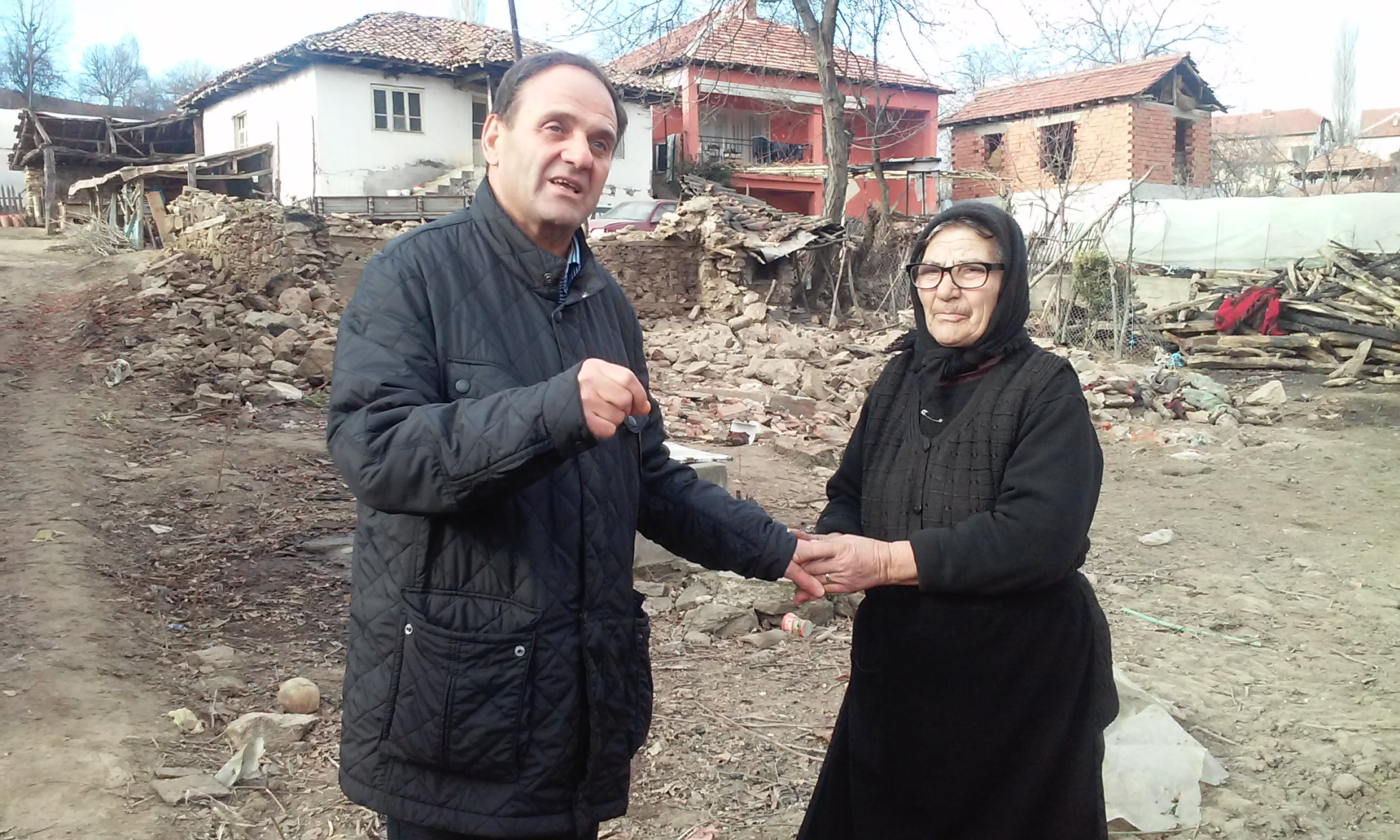 Dedino Trajkovi nov dom od Cifliganec